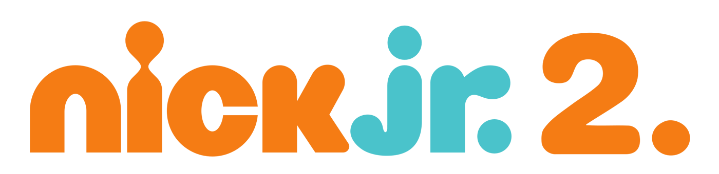 A Nick Jr. 2 logója.